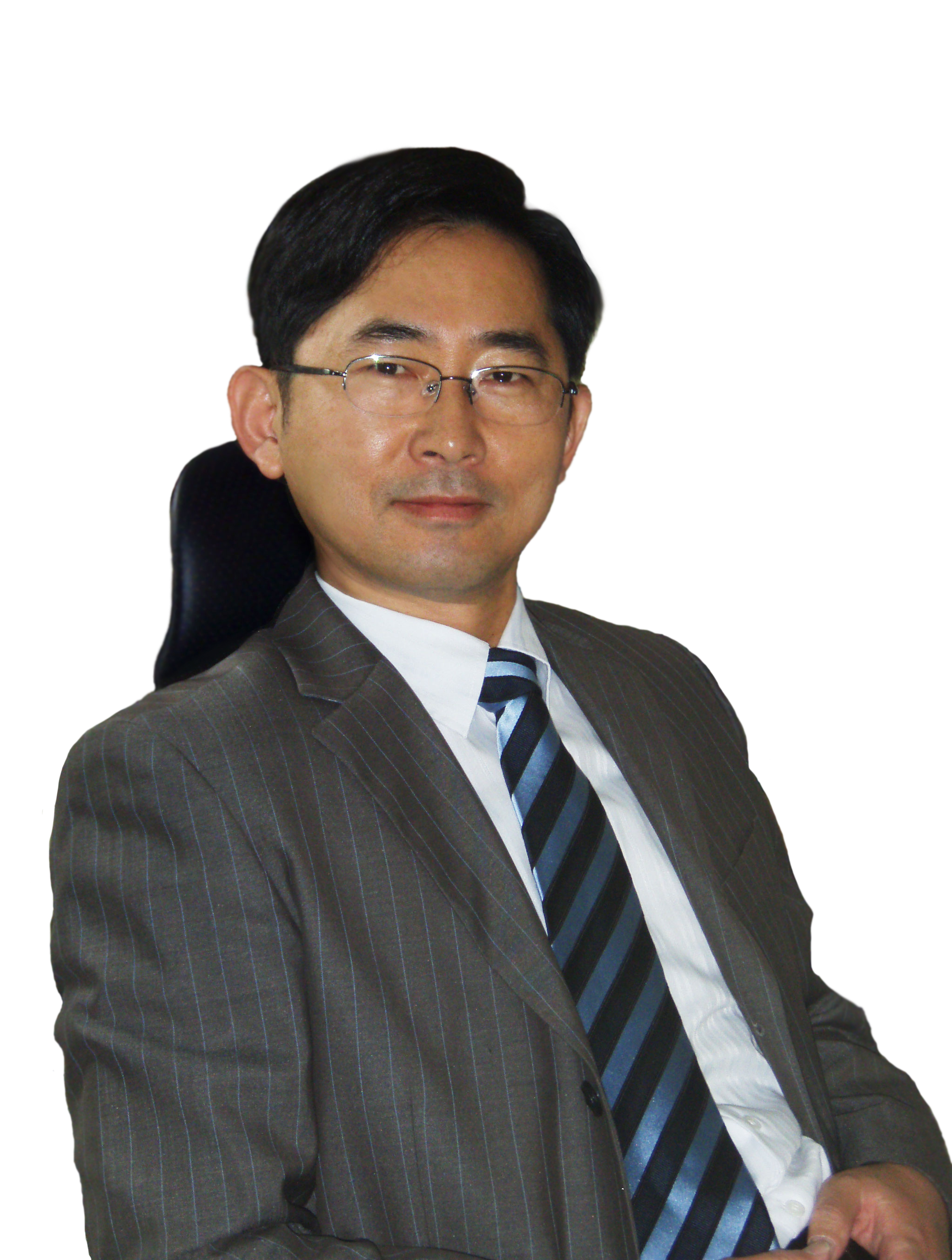 유종현 저작권=저작자 표시 조건 아래 어떠한 목적으로의 이용 가능